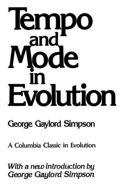 Kitabın kapağı